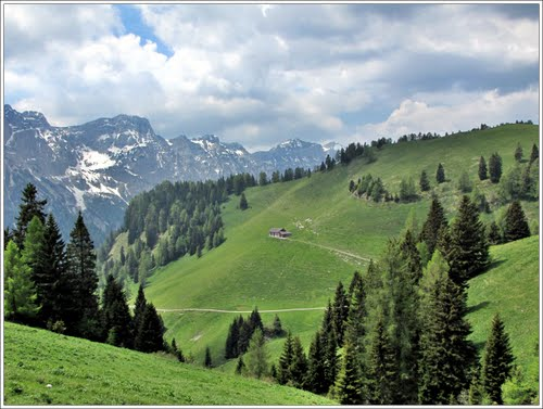 Vèneto: El campigol dele Neve in Val Noana